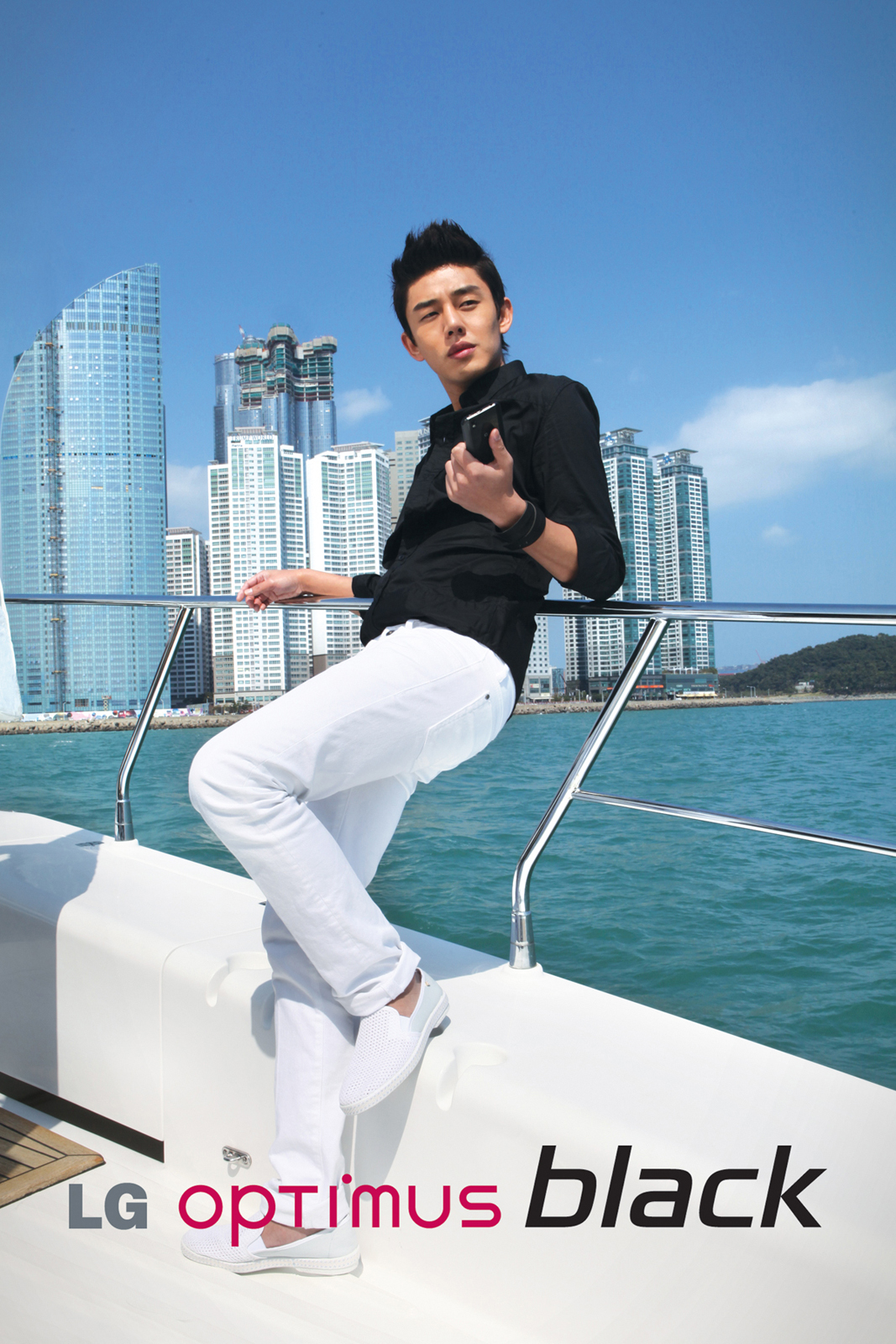 LG전자 옵티머스 블랙 광고 촬영 사진 모음- 김사랑 & 유아인